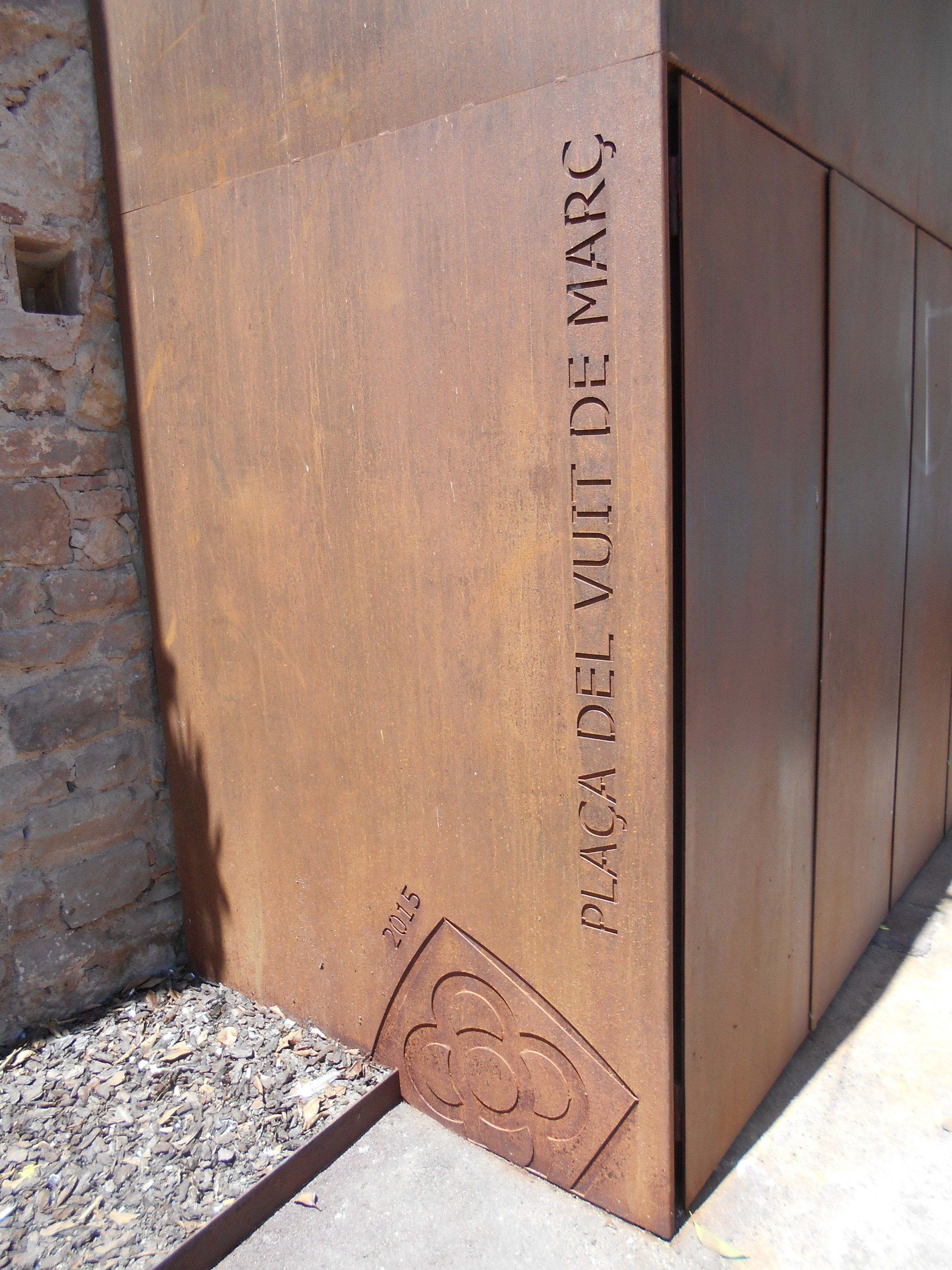 Plaça Vuit de Març, Barcelona.